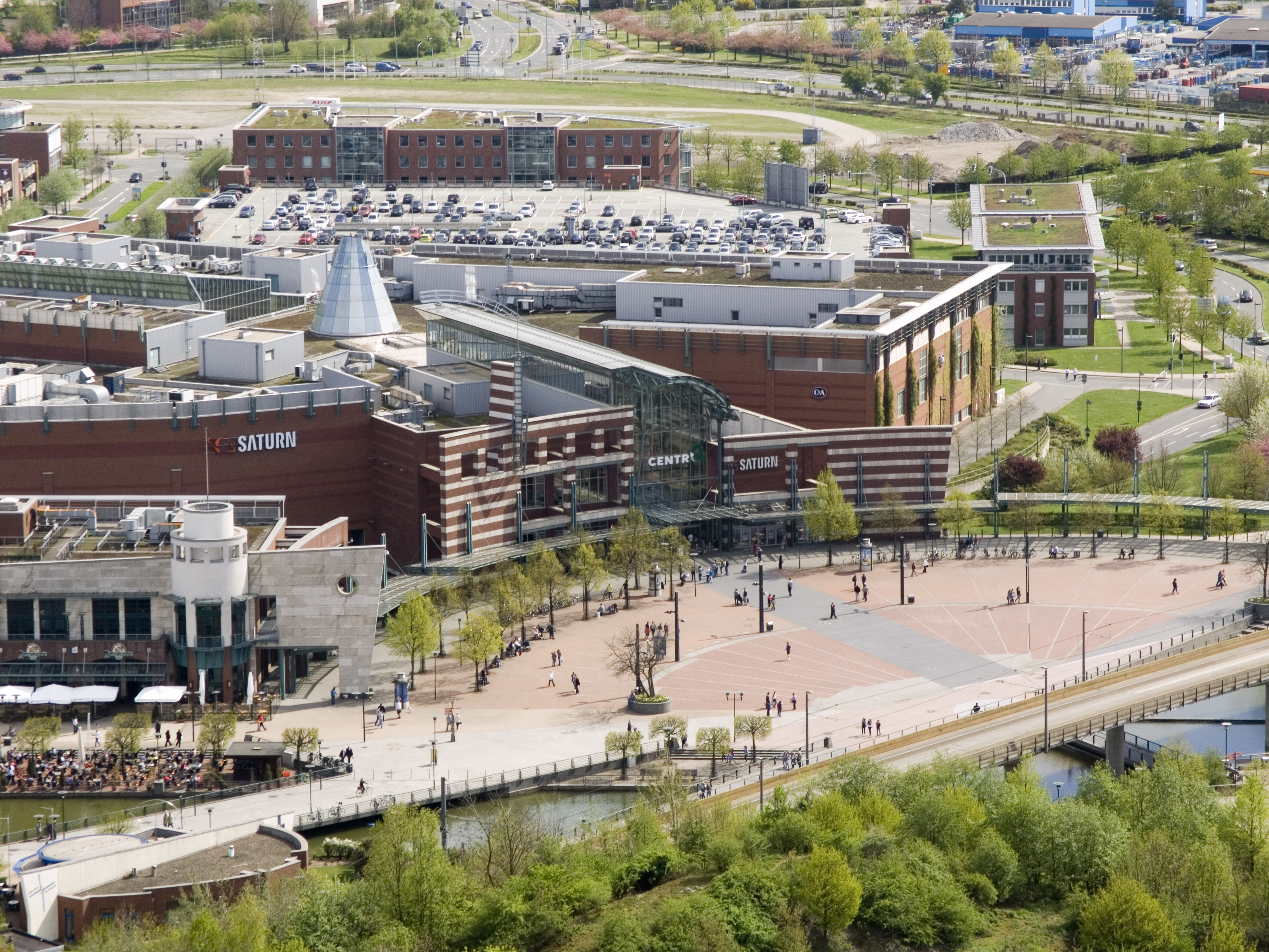 Северный Рейн - Вестфалия, Оберхаузен. CentrO (вид с Газометра)